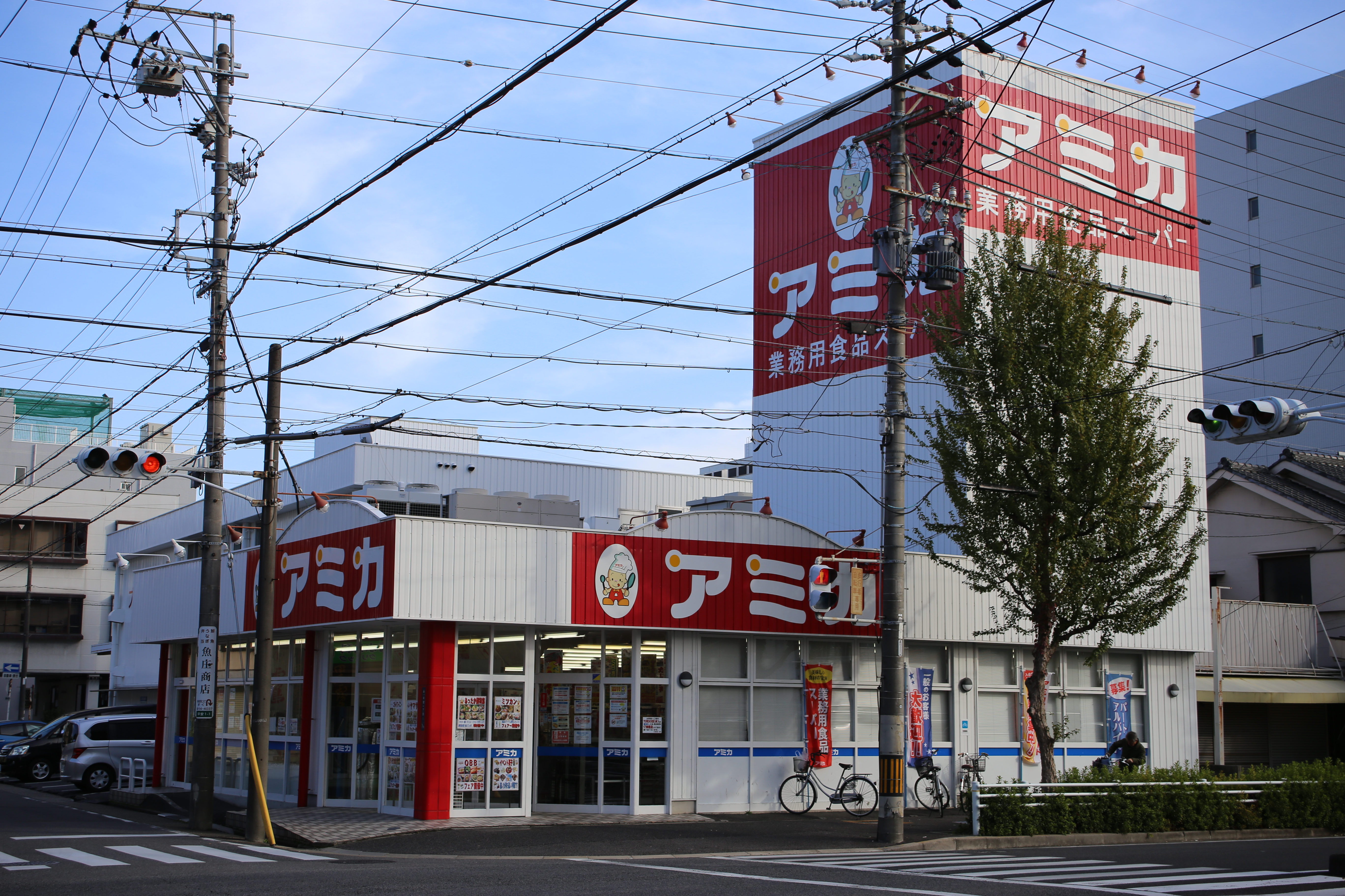 名古屋市北区平安のアミカ大曽根店